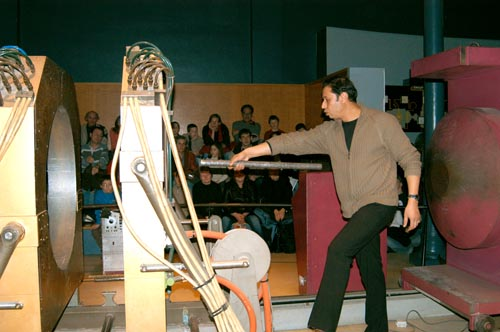 Mediateur Electro-aimant